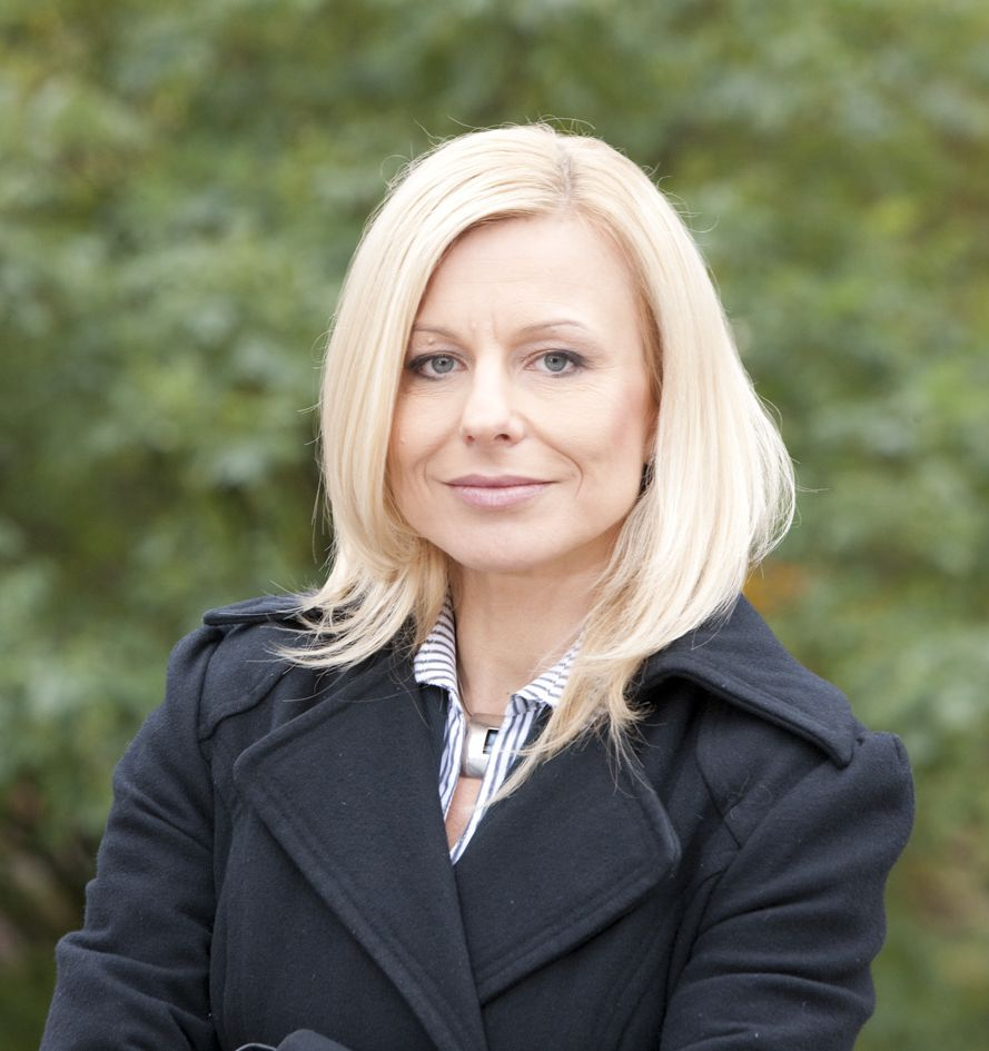 Małgorzata Tkacz-Janik